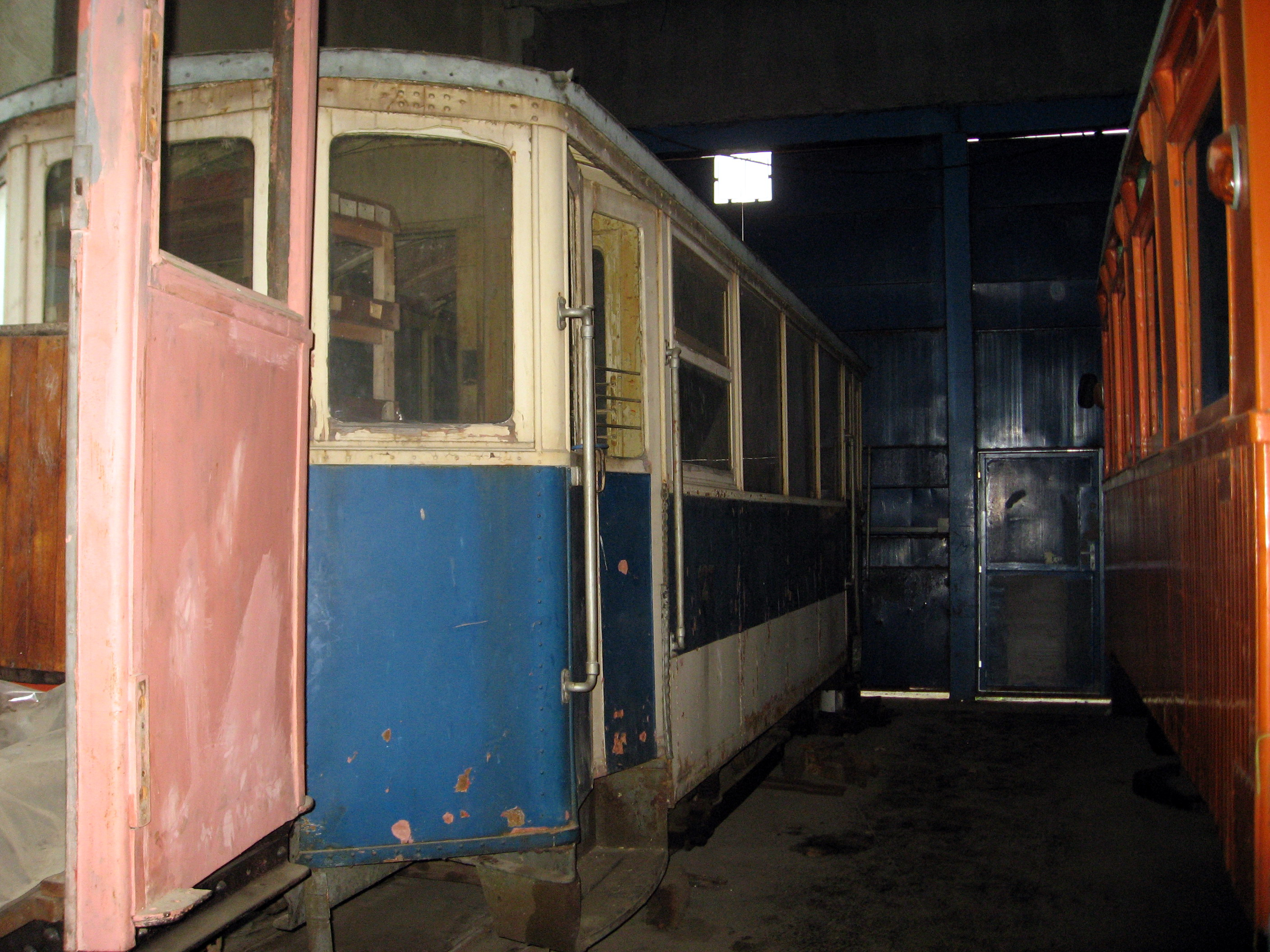 Jablonecký vlečný vůz ev. č. 44 (později v Liberci ev. č. 47), rok výroby 1932, výrobce Ringhoffer – exponát Technického muzea v Brně, depozitář MHD v Líšni